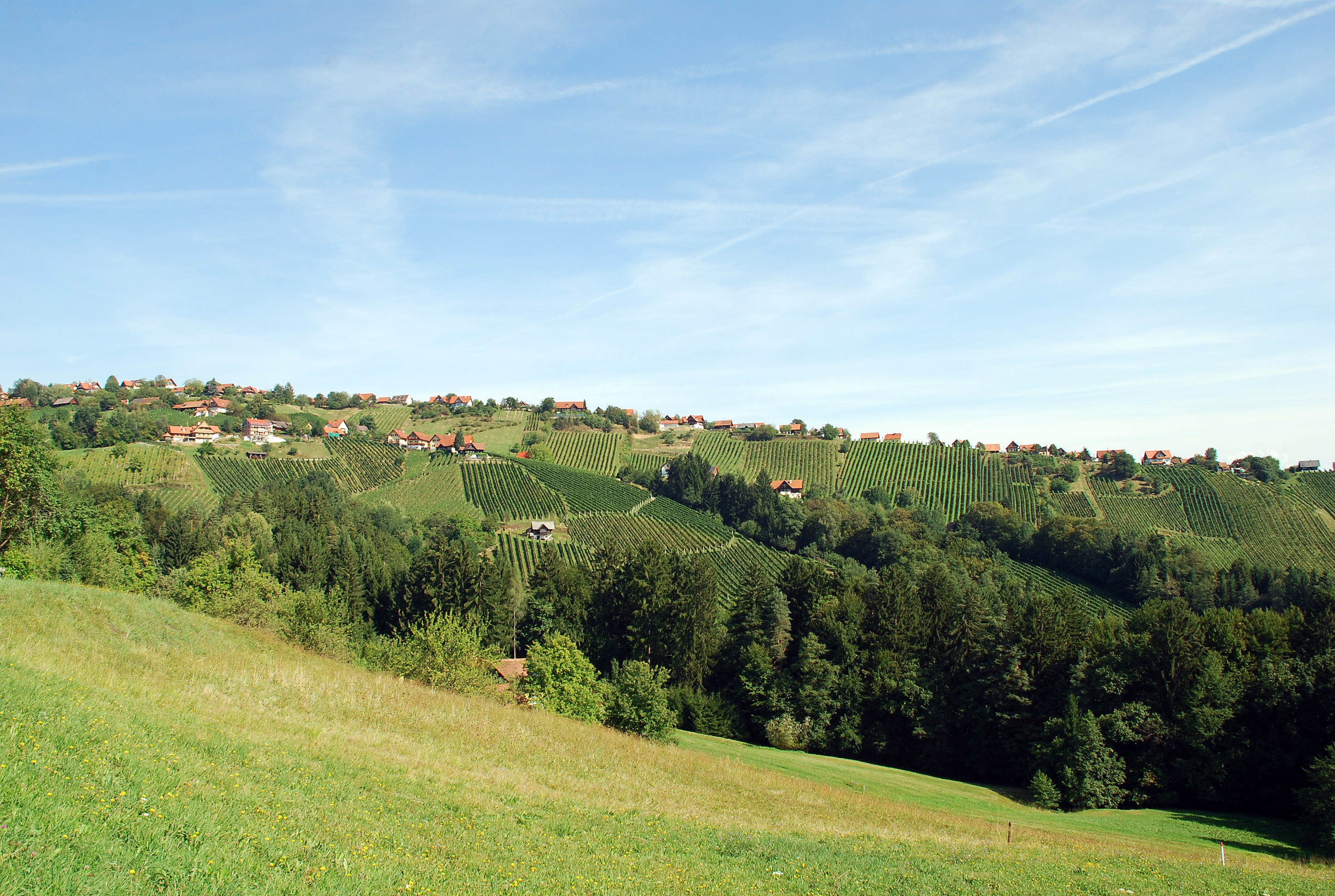 Hochgrail an den Hängen des Koralpenzuges, Gemeinde Greisdorf, Weststeiermark, Österreich. Hänge mit Weingärten, Anbaugebiet der Schilcherrebe Blauer Wildbacher